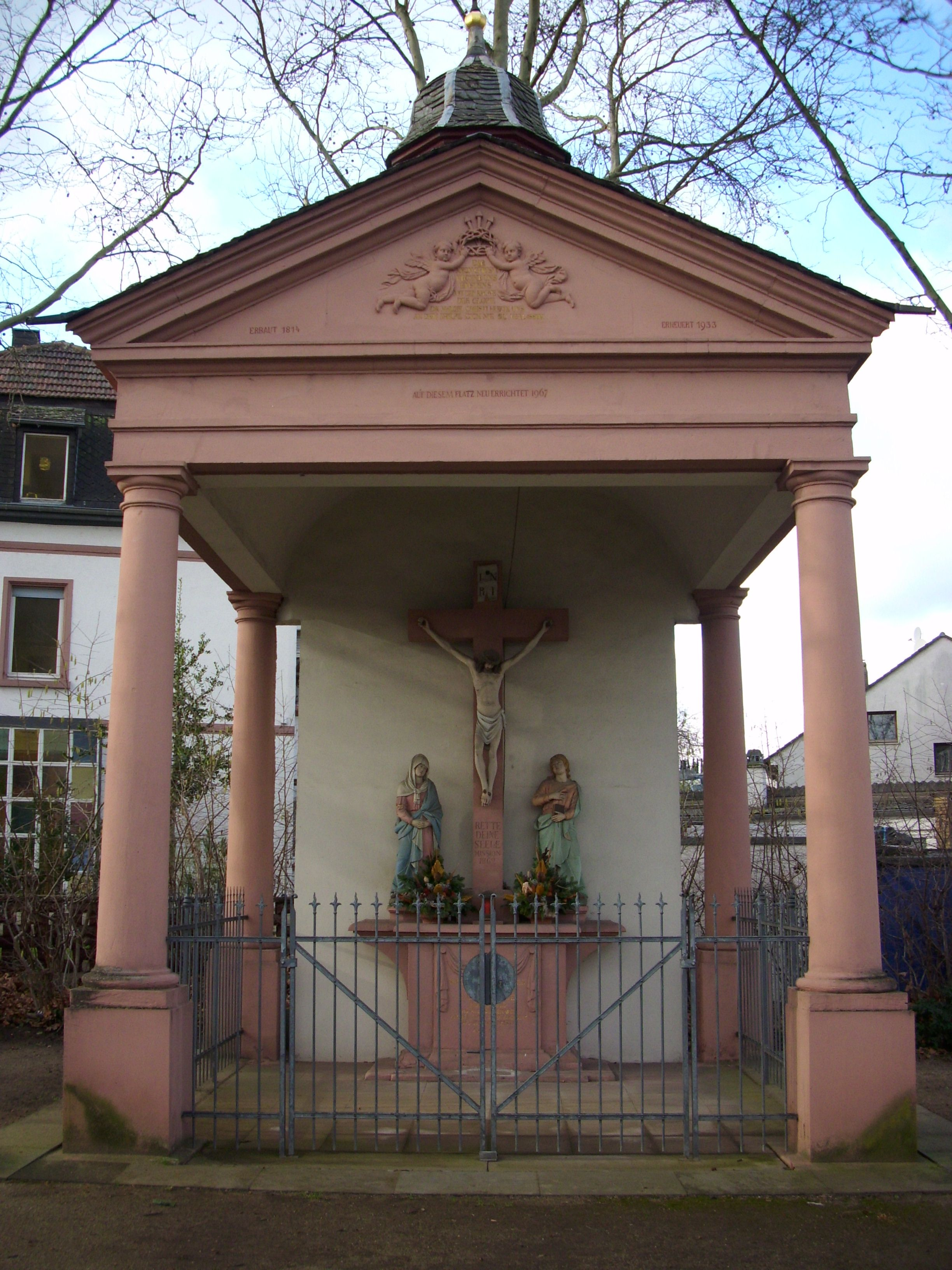 Wegekapelle, offener klassizistischer Bau mit Kreuzdach, 1814